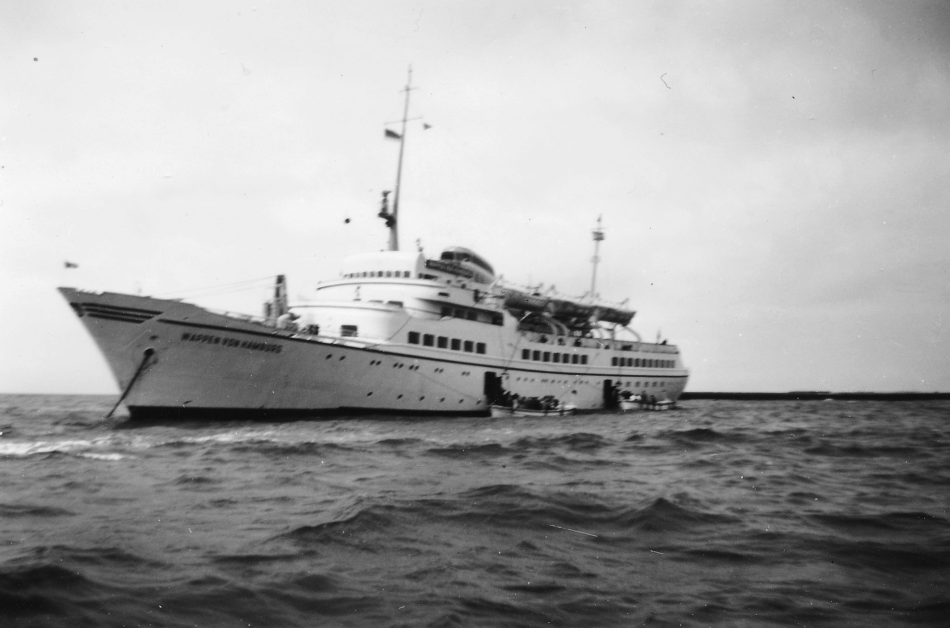 Seebäderschiff "Wappen von Hamburg I" in 1958-06 beim Ausbooten der Passagiere vor Helgoland. Erstes Schiff der Serie "Wappen von Hamburg" im Verkehr Hamburg - Helgoland von 1955–1962.